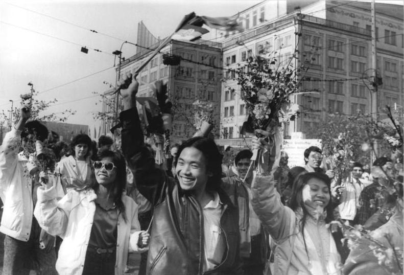 Leipzig, Maiumzug, vietnamesische Gastarbeiter ADN-ZB Gahlbeck 1.5.88 Leipzig: Mai-Demonstration- An der Kampfdemonstration der Leipziger Werktätigen nahmen auch junge Vietnamesen teil, die in der Baumwollspinnerei der Messestadt arbeiten.